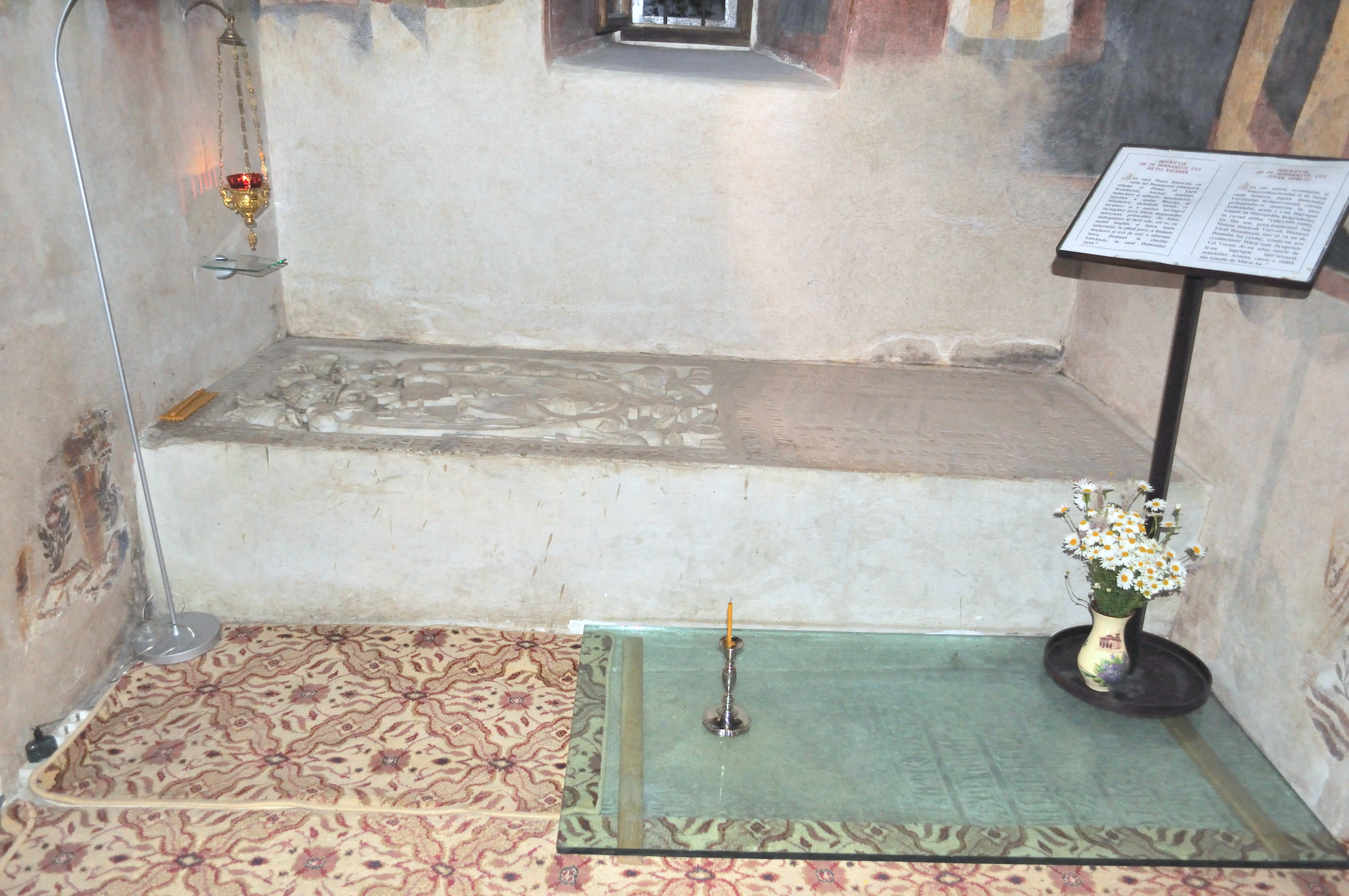 Mănăstirea Arnota, județul Vâlcea, monument istoric categoria A